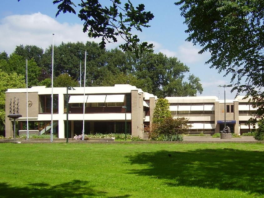 Gemeentehuis van Voorst in Twello, Nederland / the Netherlands